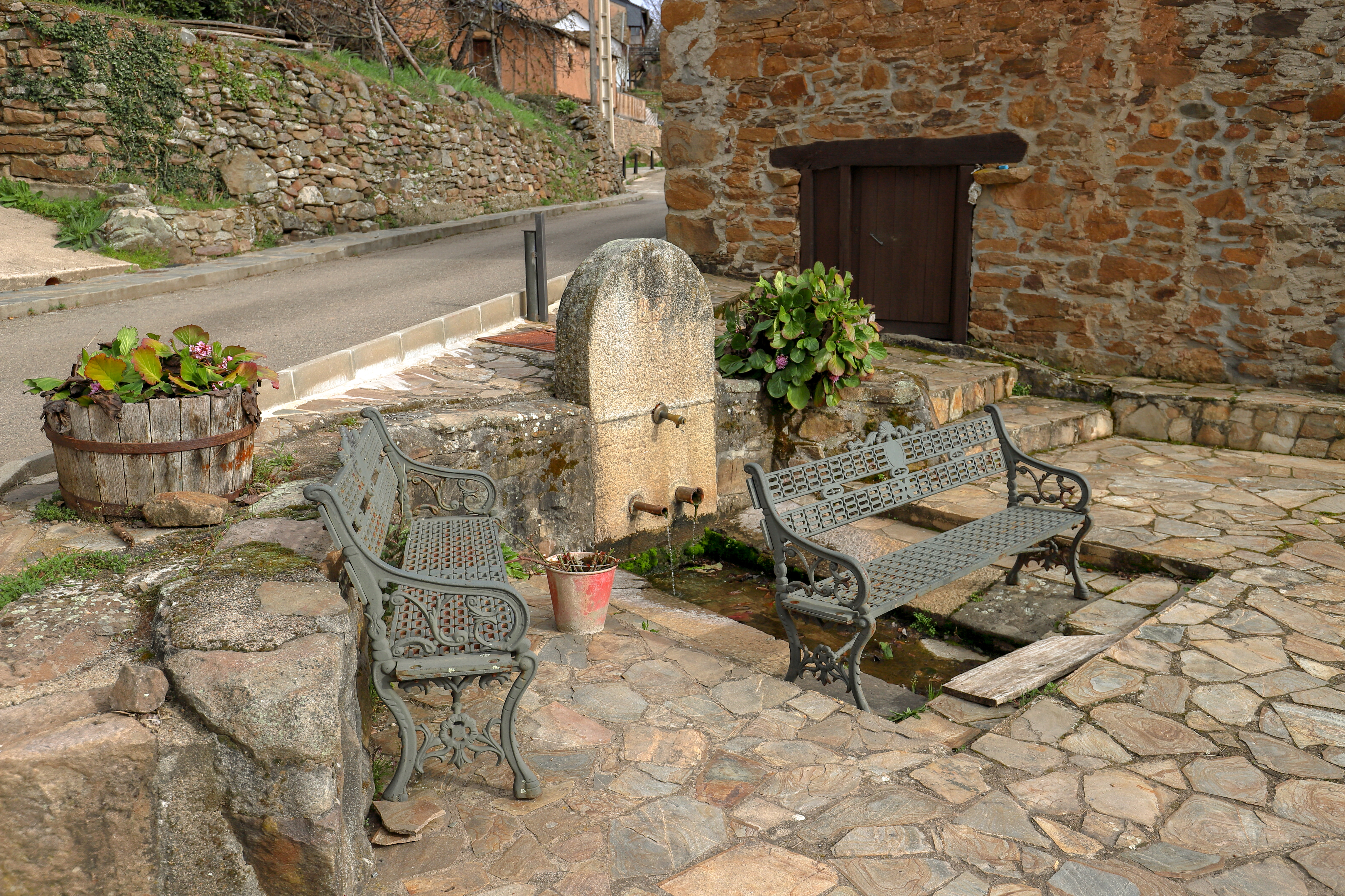 Labaniego es una localidad que pertenece al municipio de Bembibre, comarca de El Bierzo, provincia de León.